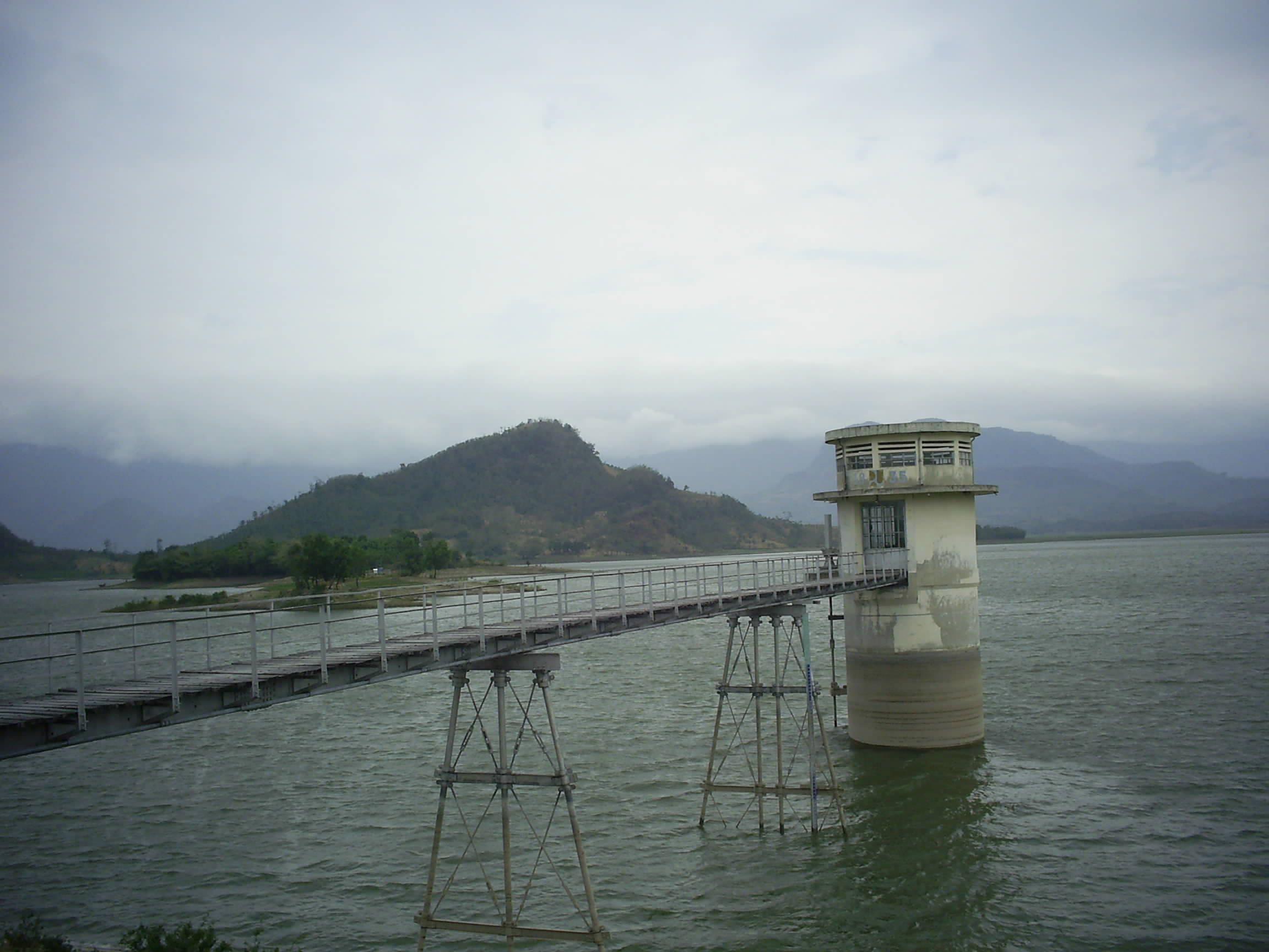 Bangunan peninggalan Belanda, warga setempat sering menyebutnya dengan istilah TURN